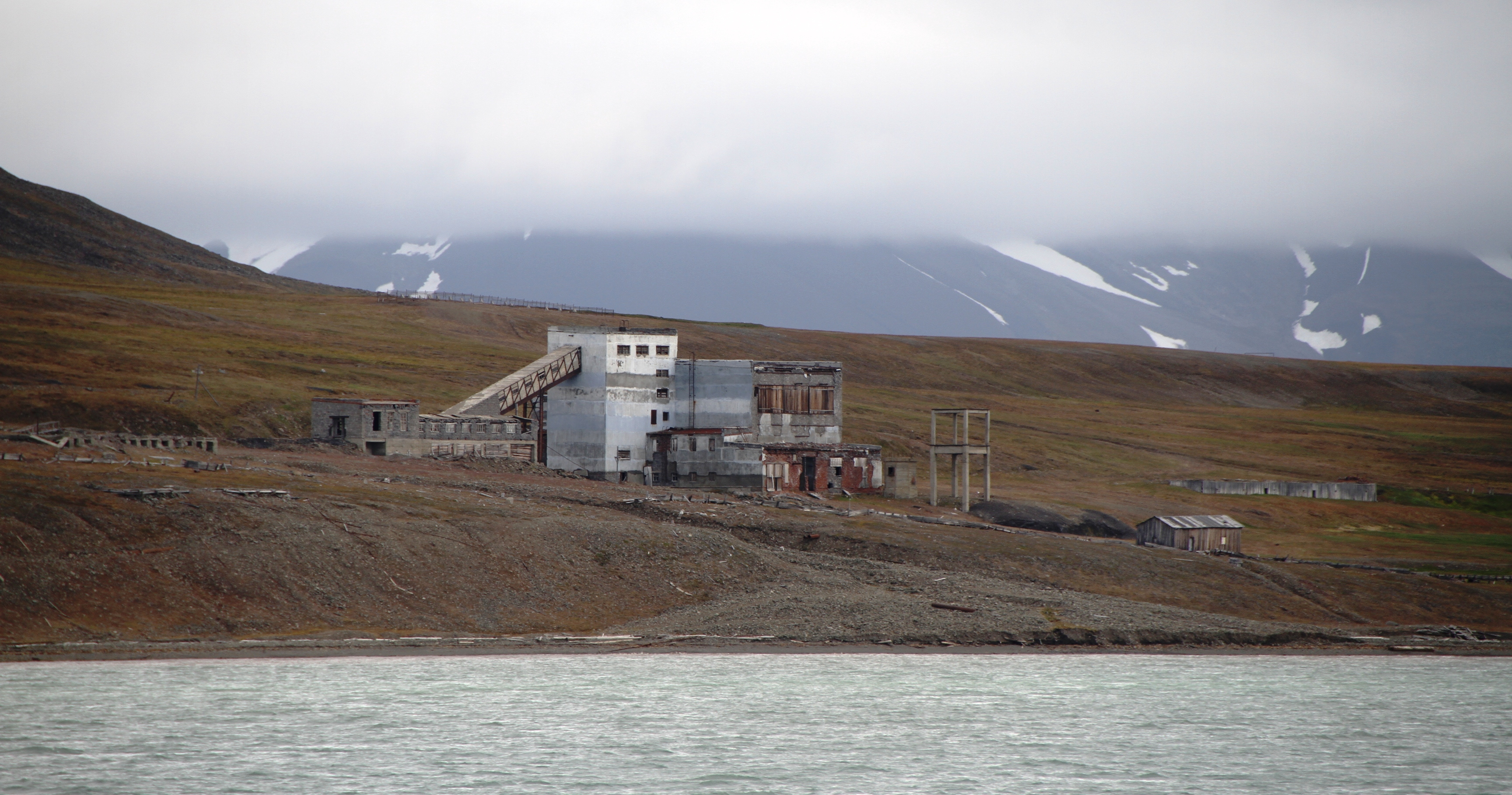 Coles Bay, former mine town in Spitsbergen until the 1960s, halfway between longyearbyen and barentsburg.